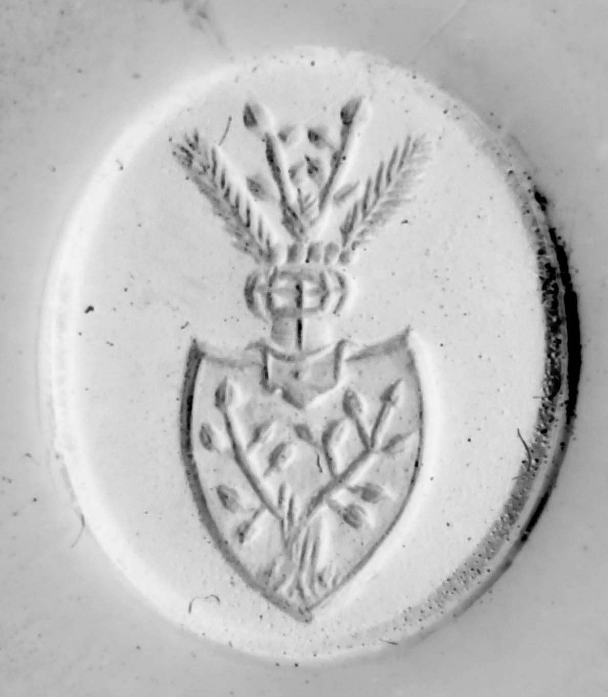 Das Familienwappen der Familie Stöckhardt